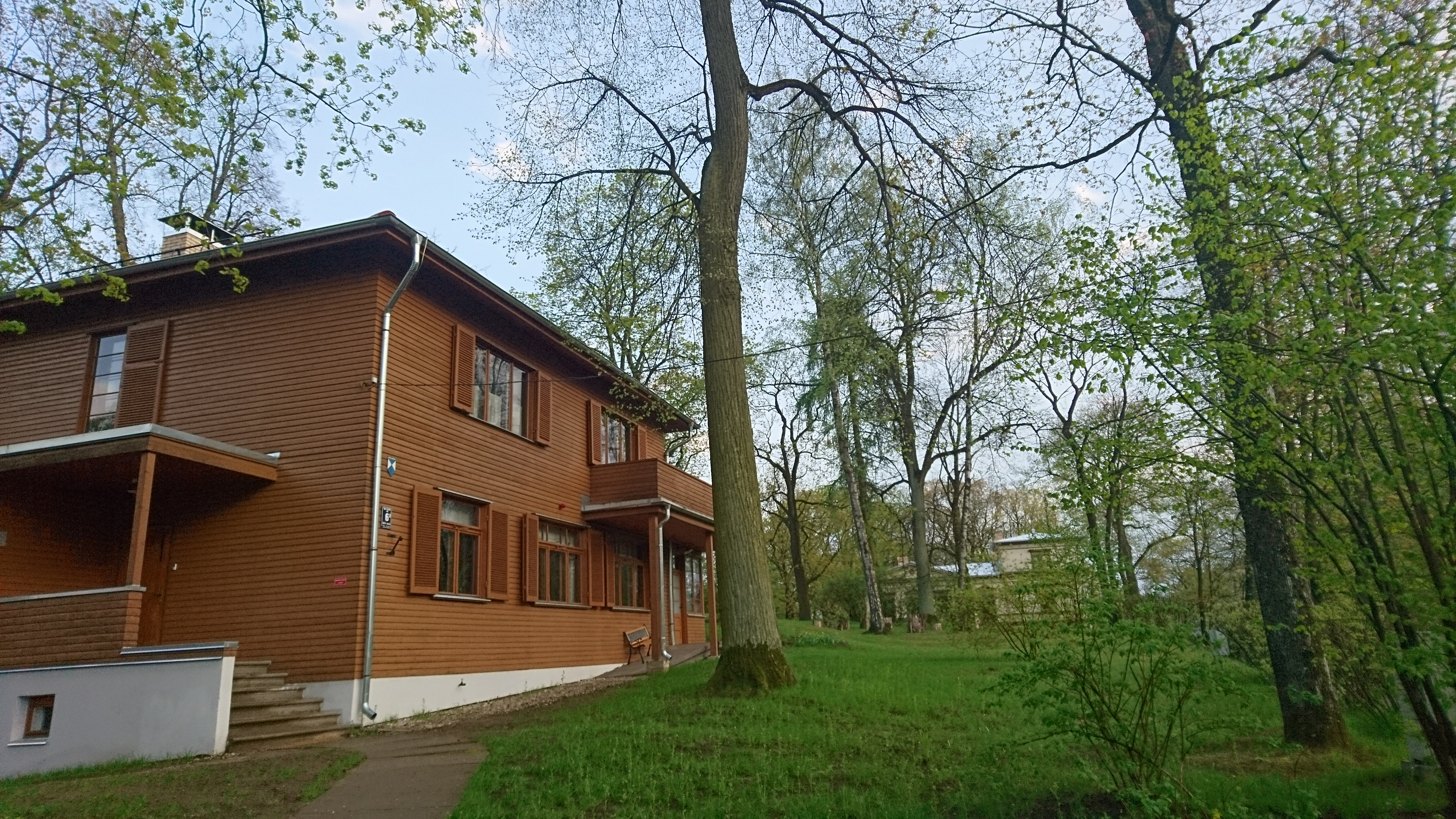 Jāņa Akuratera muzejs pēc restaurācijas